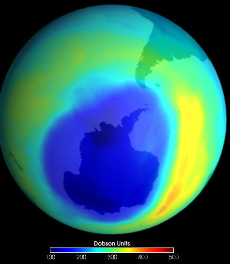 NASA: Largest-ever Ozone Hole over Antarctica von: Credit: Image courtesy the TOMS science team & and the Scientific Visualization Studio, NASA GSFC Satellite: TOMS Image Date: 09-06-2000 VE Record ID: 3766 Description: A NASA instrument has detected an Antarctic ozone "hole" (what scientists call an "ozone depletion area") that is three times larger than the entire land mass of the United States—the largest such area ever observed. The "hole" expanded to a record size of approximately 11 million square miles (28.3 million square kilometers) on Sept. 3, 2000. The previous record was approximately 10.5 million square miles (27.2 million square km) on Sept. 19, 1998.